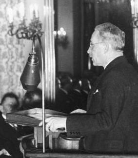 Reichsverkehrsminister Eltz v. Rübenach sprach gestern im Verkehrsministerium vor der Presse über die Gegenwartsaufgaben der Reichsverkehrspolitik etwa 1935/36